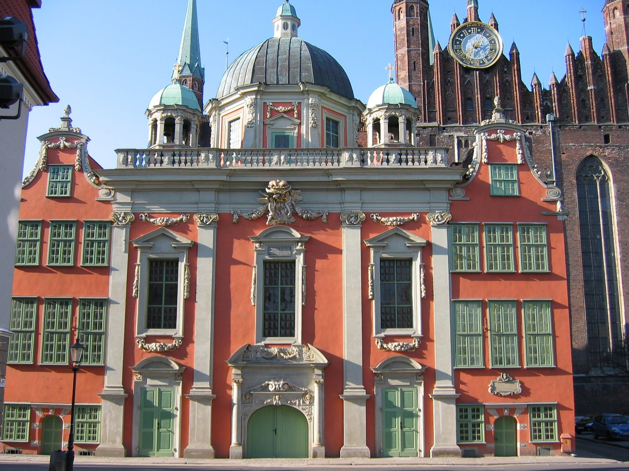 Kinch Chapel, Gdansk, Poland